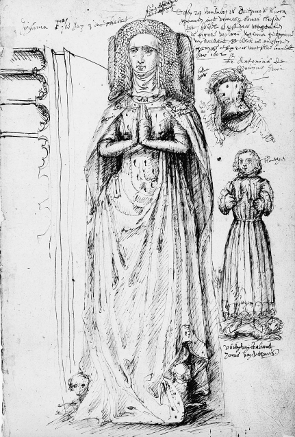 Gisants de Jeanne de Brabant († 1406) et de Guillaume de Brabant († 1410)